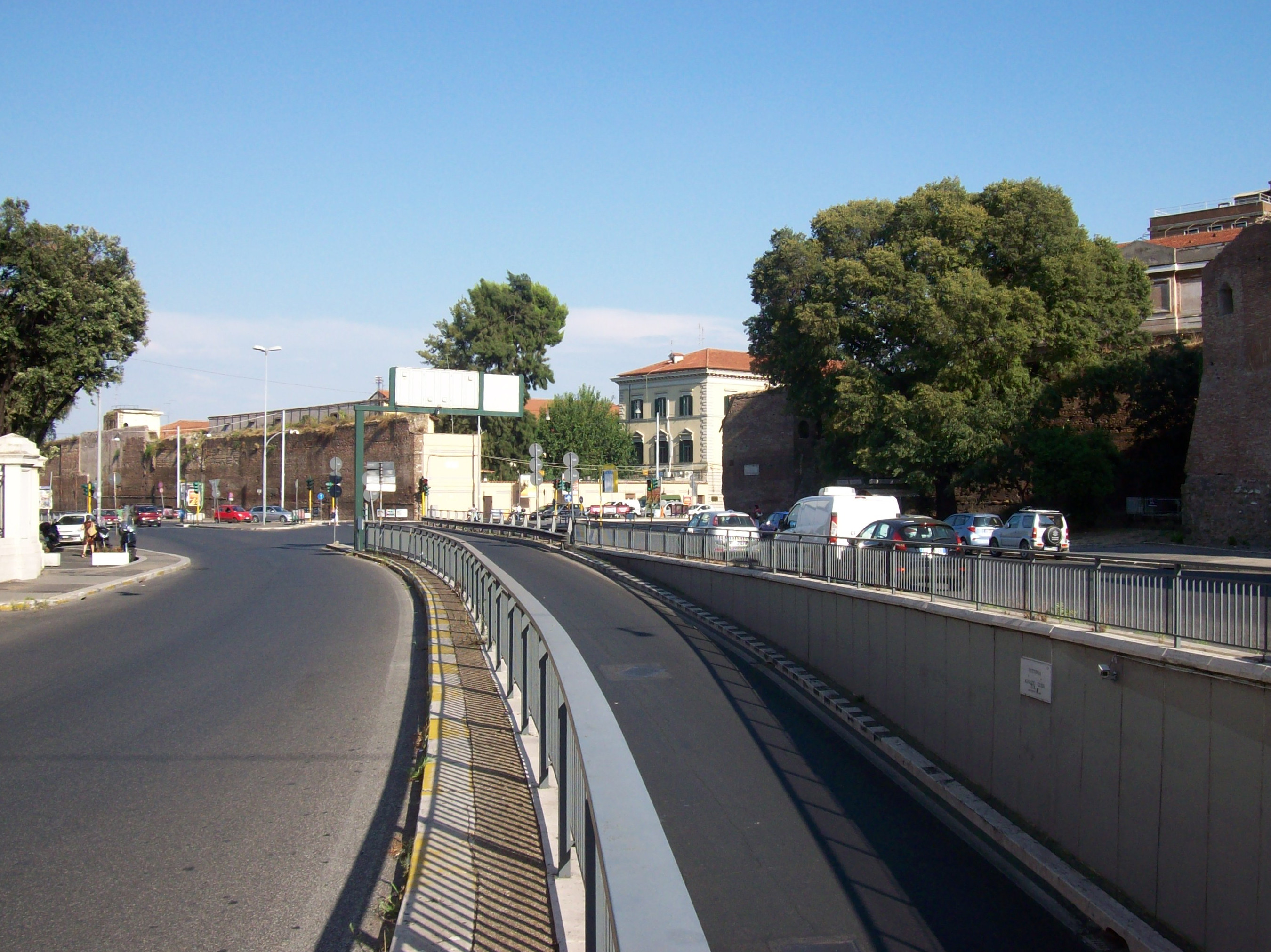 Piazzale della Croce Rossa a Roma; in primo piano sono visibili il tratto finale di Viale del Policlinico e il sottovia Ignazio Guidi, primo tratto del tunnel stradale che conduce a via del Muro Torto e a piazzale Flaminio sottopassando gli incroci con Porta Pia e via Nomentana, Piazza Fiume e via Salaria, Porta e via Pinciana